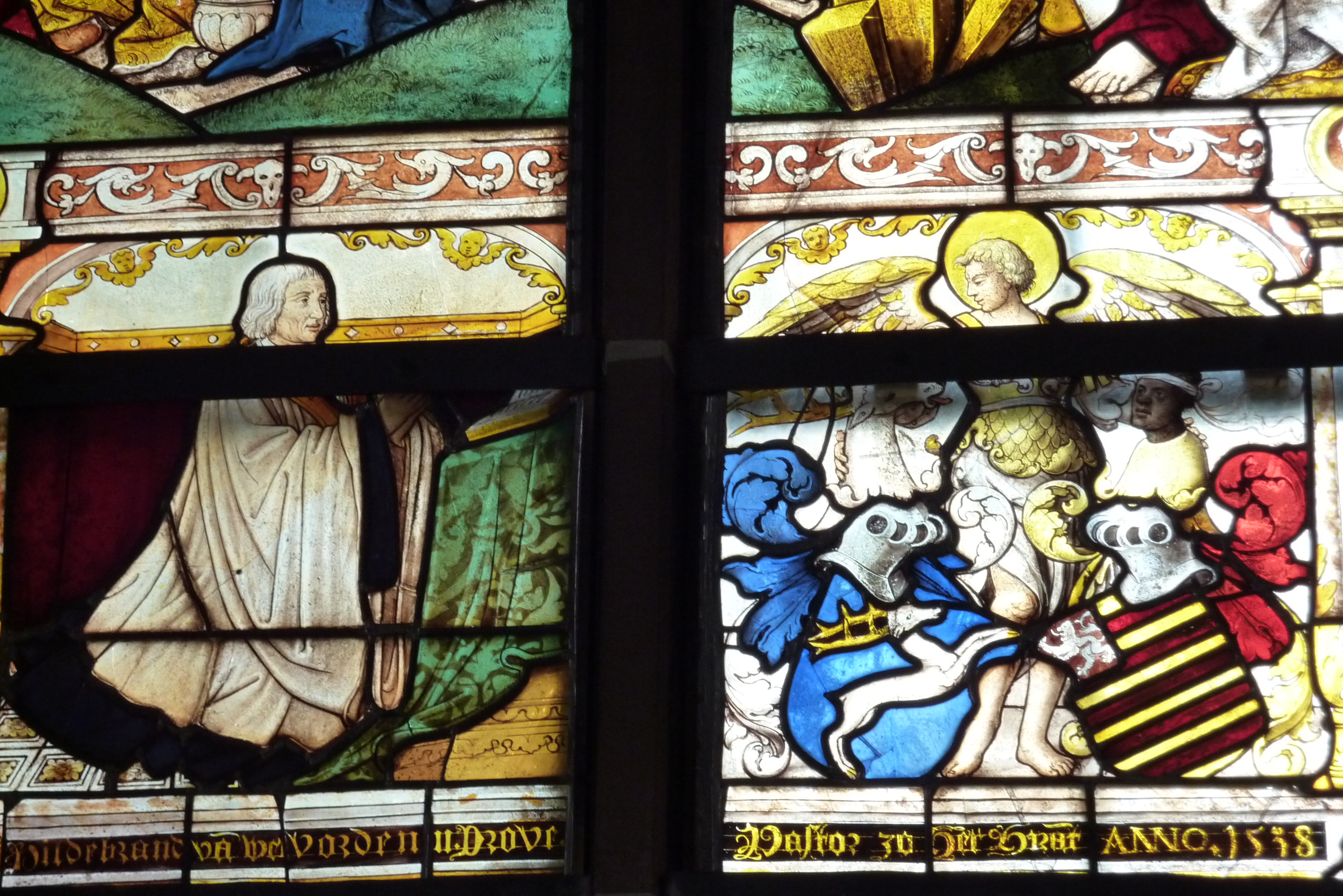 Ausschnitt eines Bleiglasfensters in der katholischen Pfarrkirche St. Martin in Drove, Zitat aus Heinrich Oidtmann: Die rheinischen Glasmalereien vom 12. bis zum 16. Jahrhundert. Bd. 2, Schwann Verlag, Düsseldorf 1929, 423: "Das zweiteilige Fenster zeigt eine ... figurenreiche Kreuzigungsgruppe ohne jedwede Umrahmung. Darunter sieht man in Renaissancerahmen links das stark erneuerte Bildnis des Stifters, vor einem Betpult kniend, rechts einen Engel als Schildhalter für die beiden elterlichen Wappen Bernhard von Wevorden und Fritza von Thorr des Pastors Hildbrand von Wevorden, gent. Droiff, der am 6. November 1537 starb. Sämtlich Teile bewegen sich in den ausgereiften Formen der Renaissance; die Inschrift nennt das Jahr 1538. Im Maßwerk hat man das Wappen von Rohe untergebracht aus dem Jahre 1741; in den Zwickeln Engelsköpfchen."